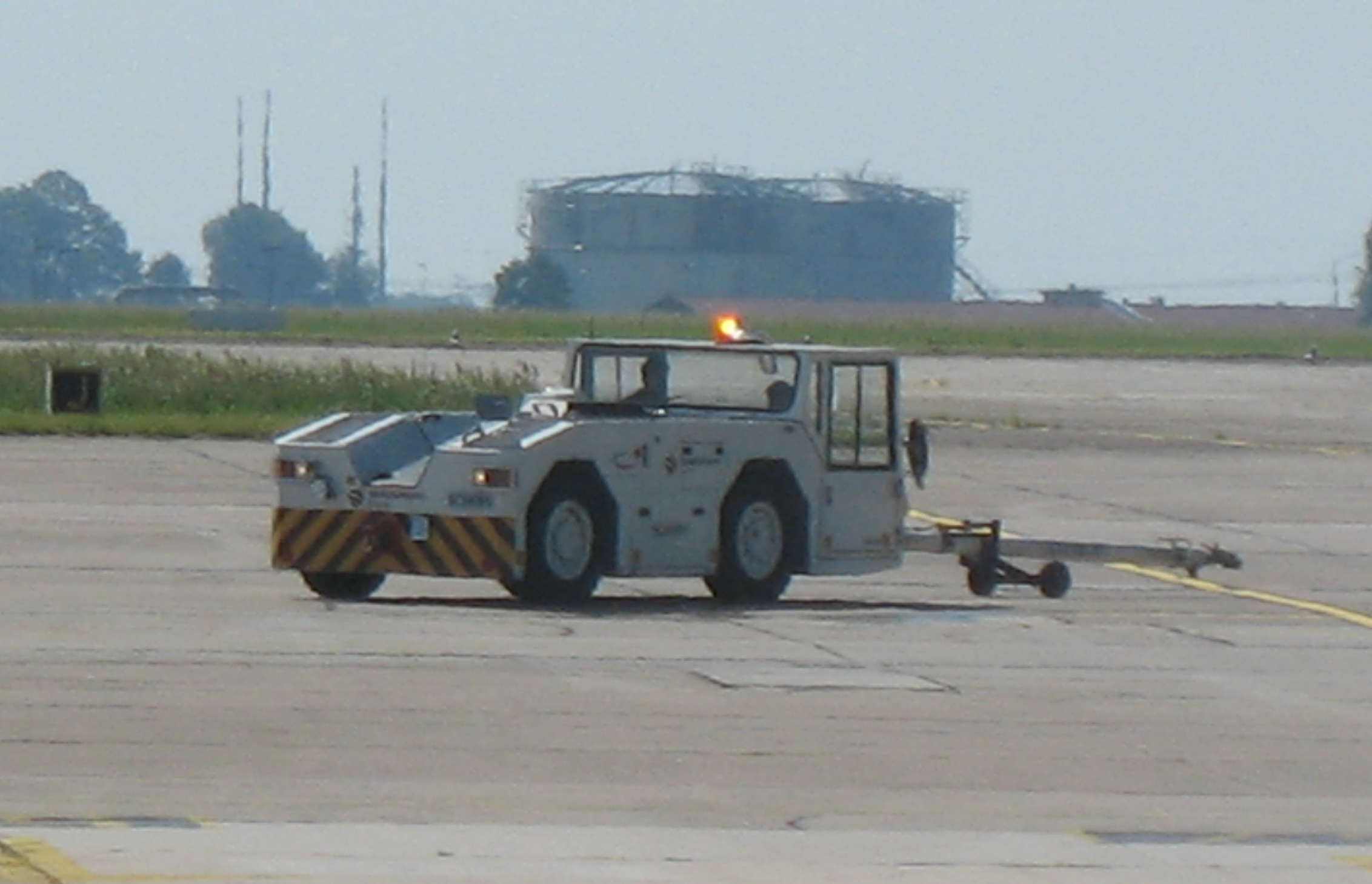 Flugzeugschlepper F160 der SCHOPF Maschinenbau GmbH